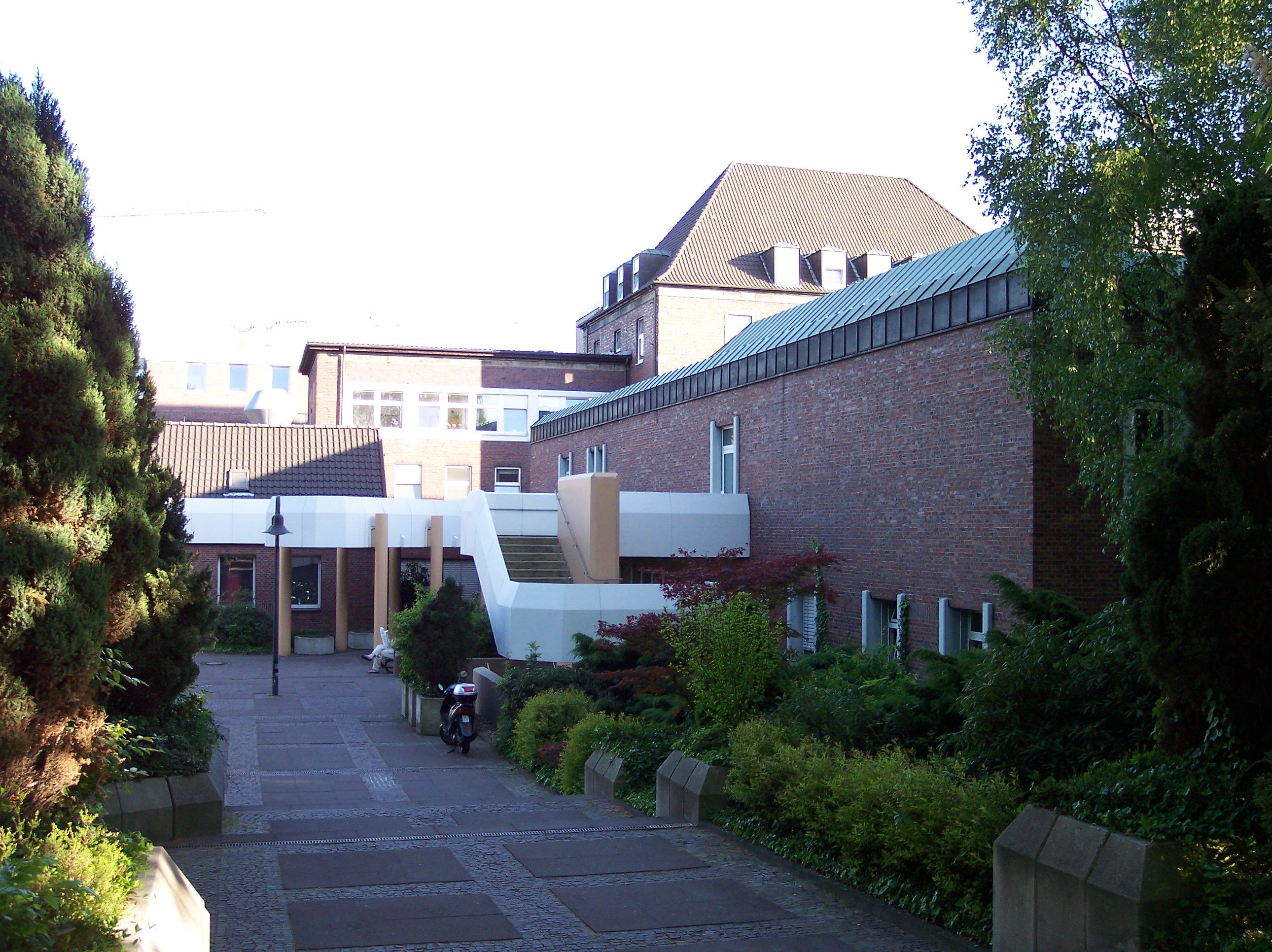 Bergmannsheil Buer